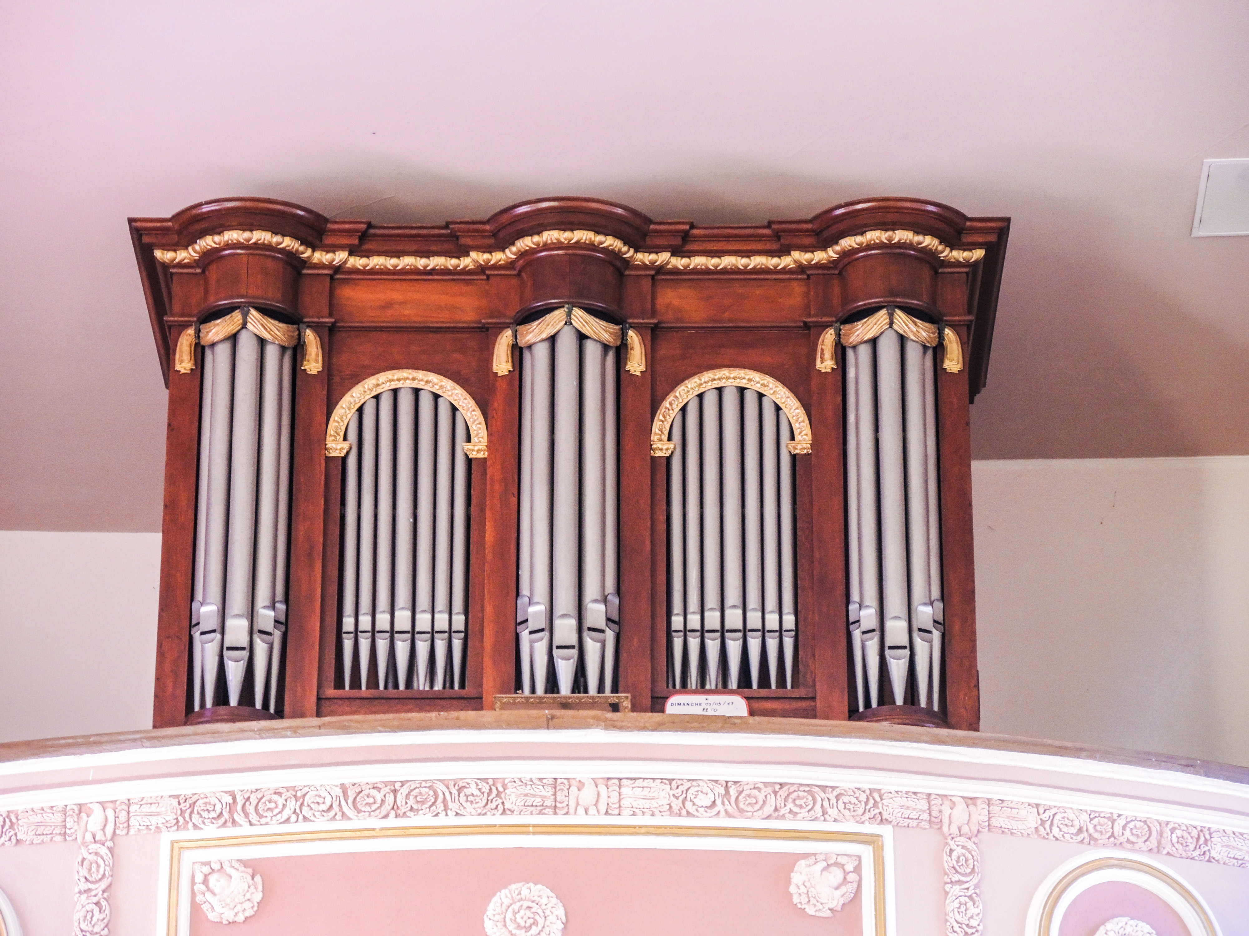 Orgue Rikenbach, dans l'église de Soppe-le-Bas. Haut-Rhin. This object is classé Monument Historique in the base Palissy, database of the French furniture patrimony of the French ministry of culture, under the references PM68000942, IM68006567 and PM68000565.